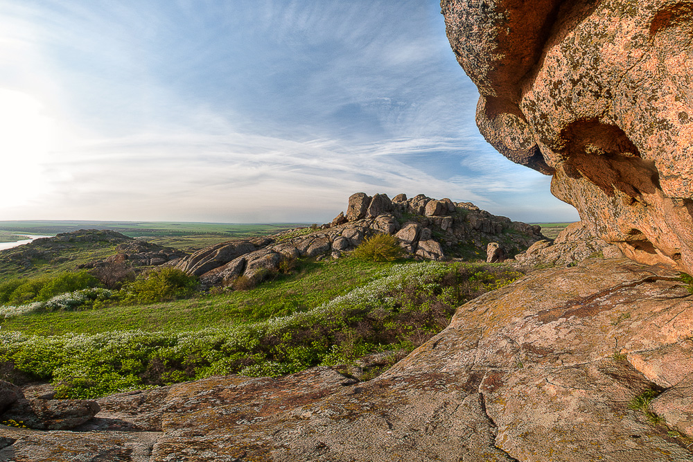 Український степовий природний заповідник Кам'яні Могили